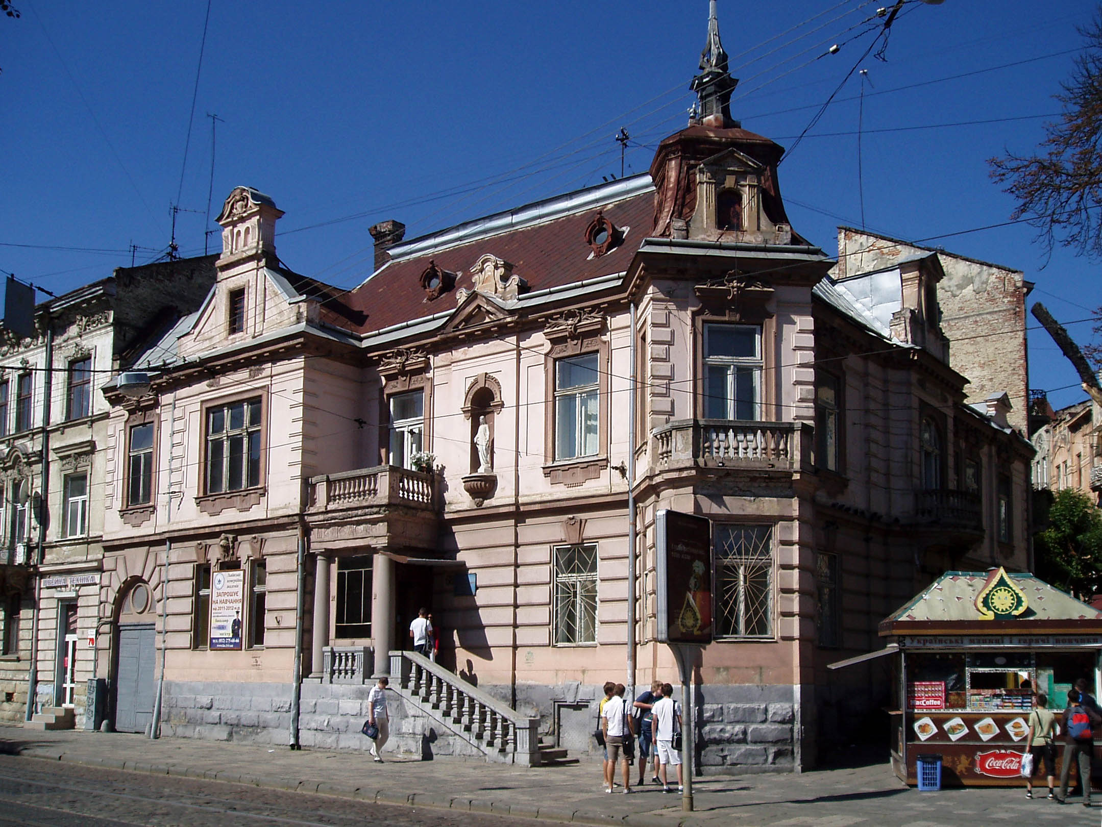 Колишній житловий будинок кінця 19 ст. у Львові на вулиці Франка, 68. Збудований за проектом Вінцента Равського-молодшого (1857—1927).